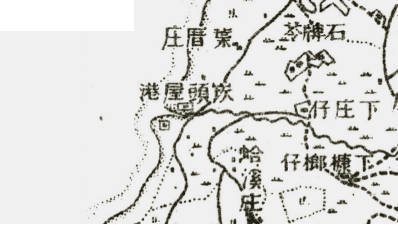 1897年永安漁港的前身,崁頭屋港